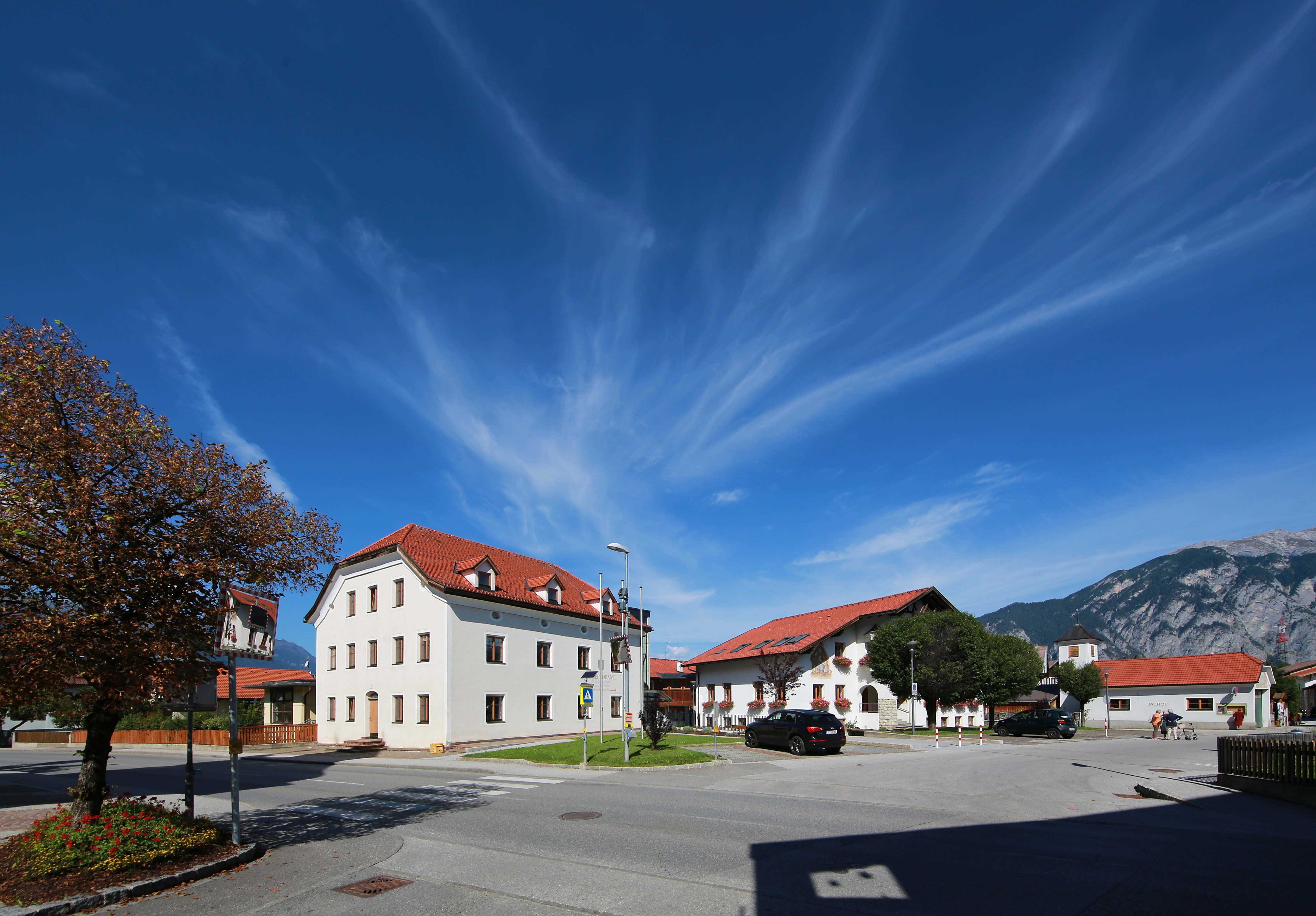 Birgitz Dorfplatz mit Gemeindeamt, Volksschule, Bauhof, Landesstraße L12